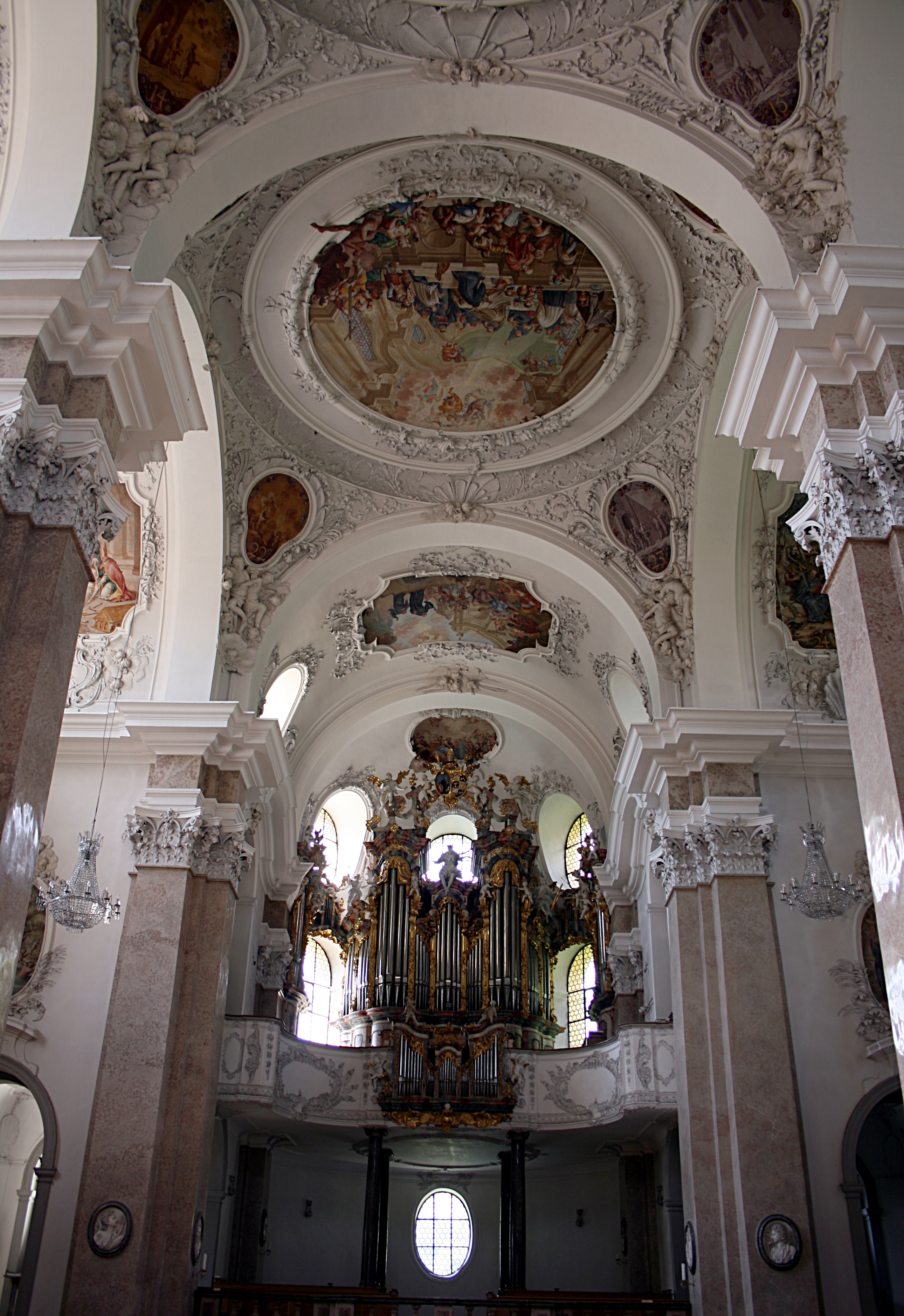 Füssen_St_Mang_Empore